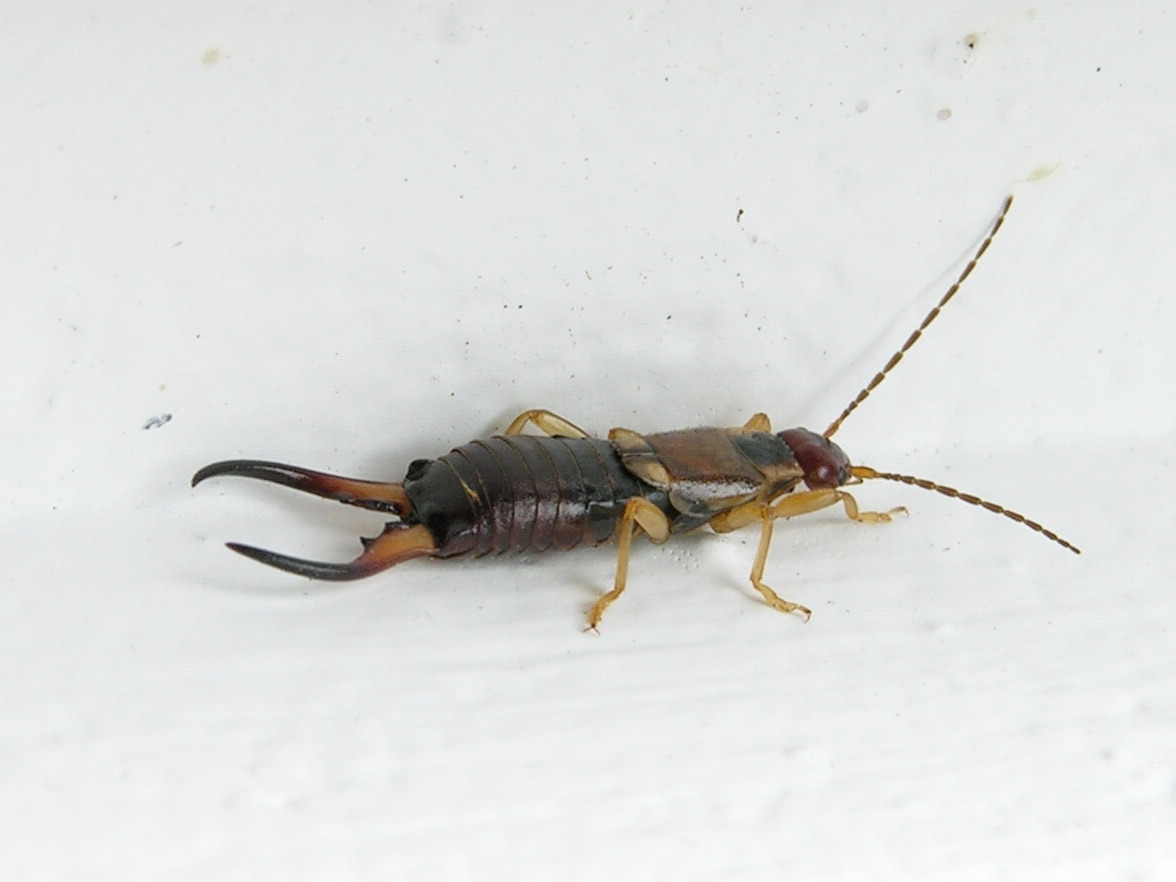 Foto dunha realizada en Bastavales Galicia Publish by= Luis Miguel Bugallo Sánchez. Self made